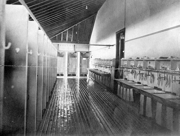 Repronegatief. Wasruimte met w.c.'s van het internaat te Brastagi, aan de voet van de vulkaan Deleng Sibajak, Noord-Sumatra, met een wasbak en aparte douche voor ieder kind